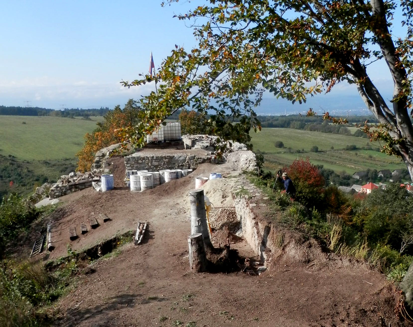 Pohľad na hrad Šebeš v čase jeho obnovy. Obec Podhradík.